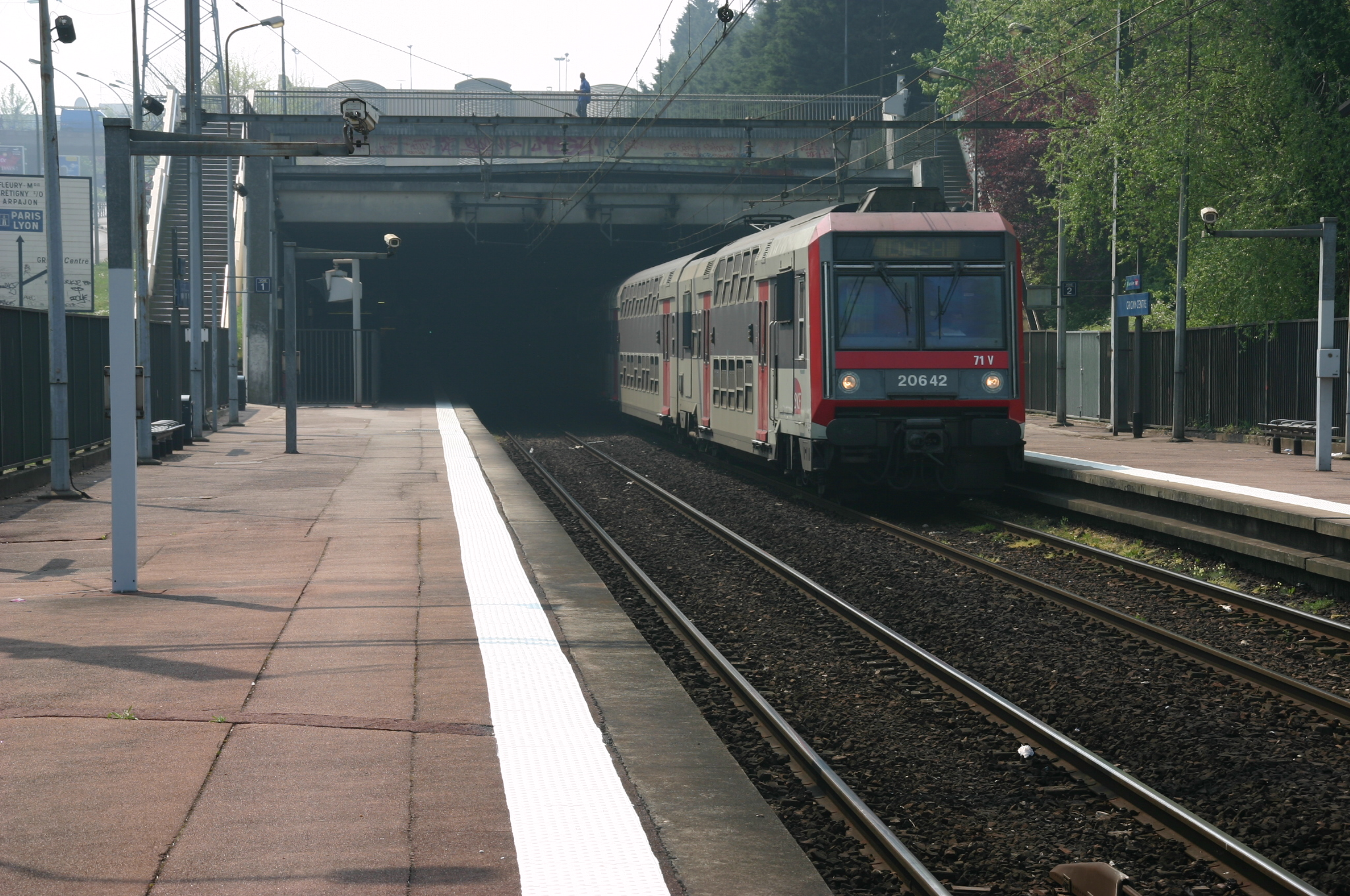 La Gare de Grigny-Centre , Grigny, département de l'Essonne, France